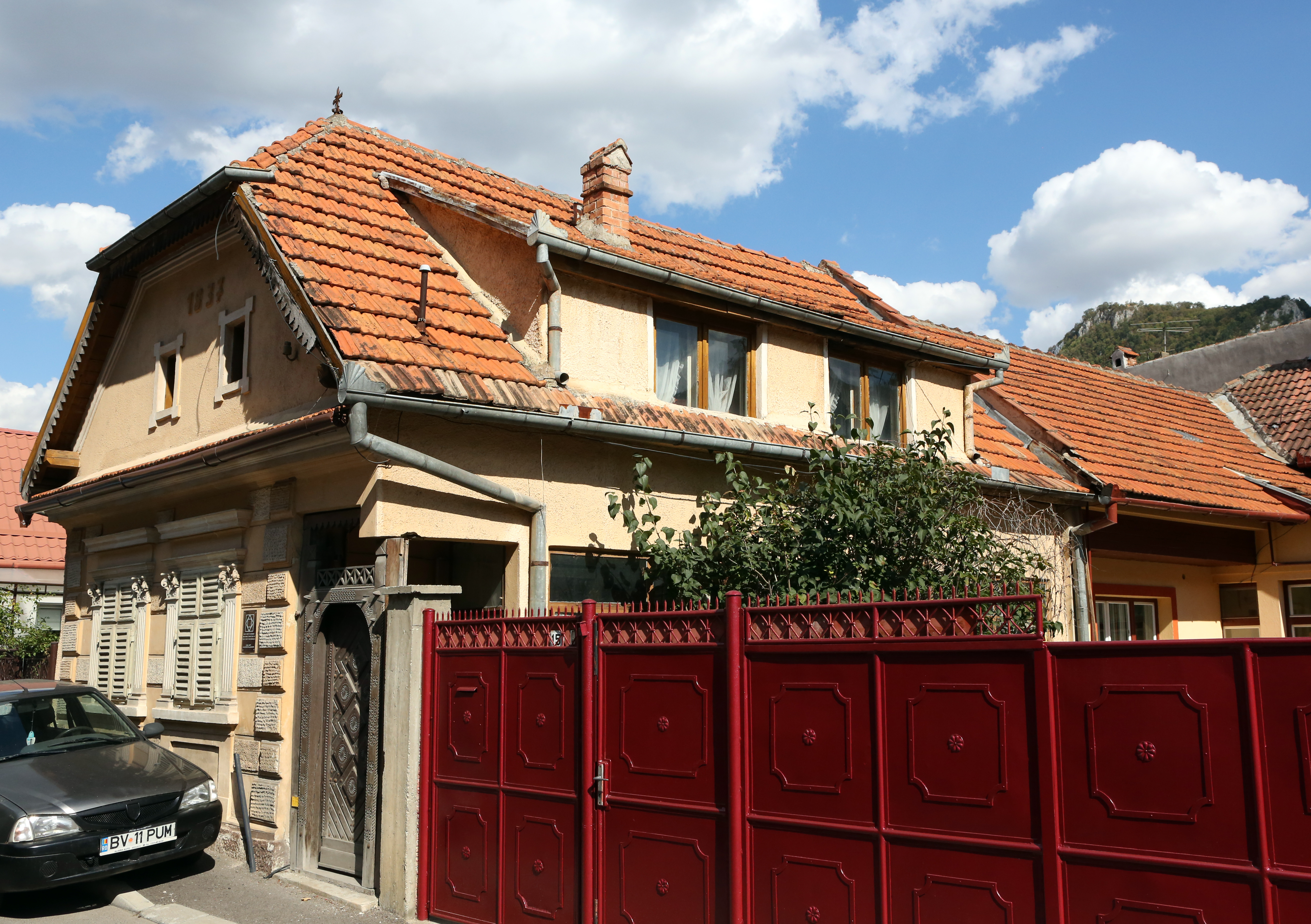 Casa de pe str. Pe Tocile 15, Brașov